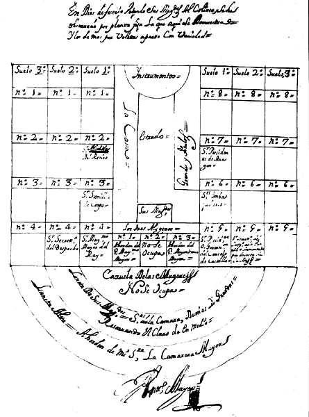 Coliseo buen retiro